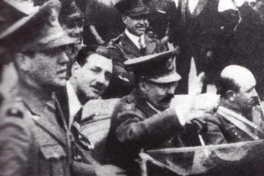 Juan Perón (izquierda) con el dictador José Uriburu (saludando en el coche derecha). Golpe de estado de 1930.